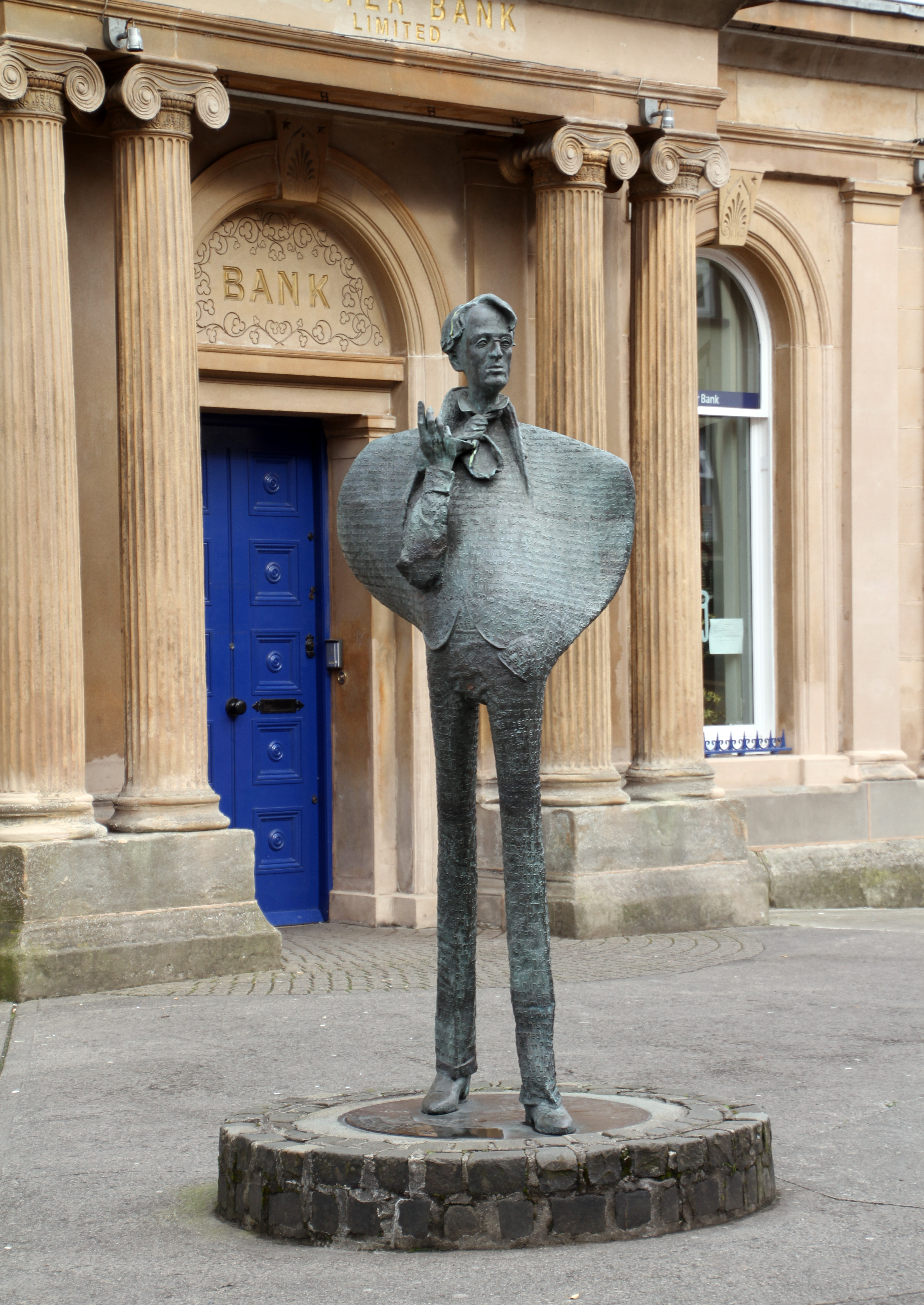 Sligo in Irland